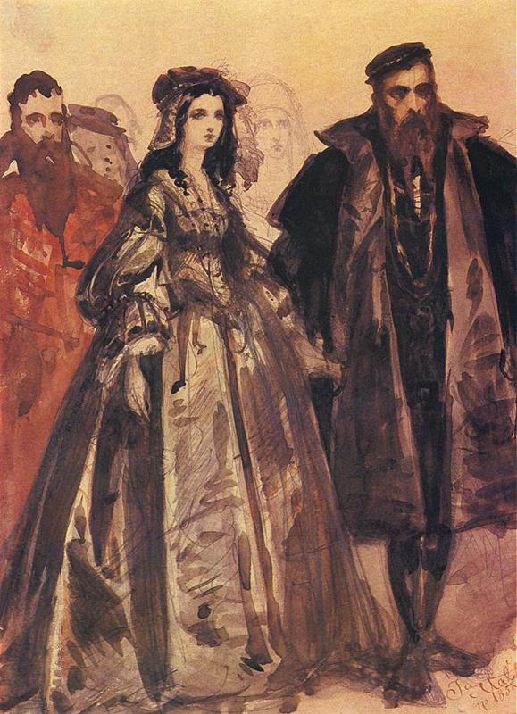 Zygmunt II August prezentuje na dworze Barbarę Radziwiłłównę.